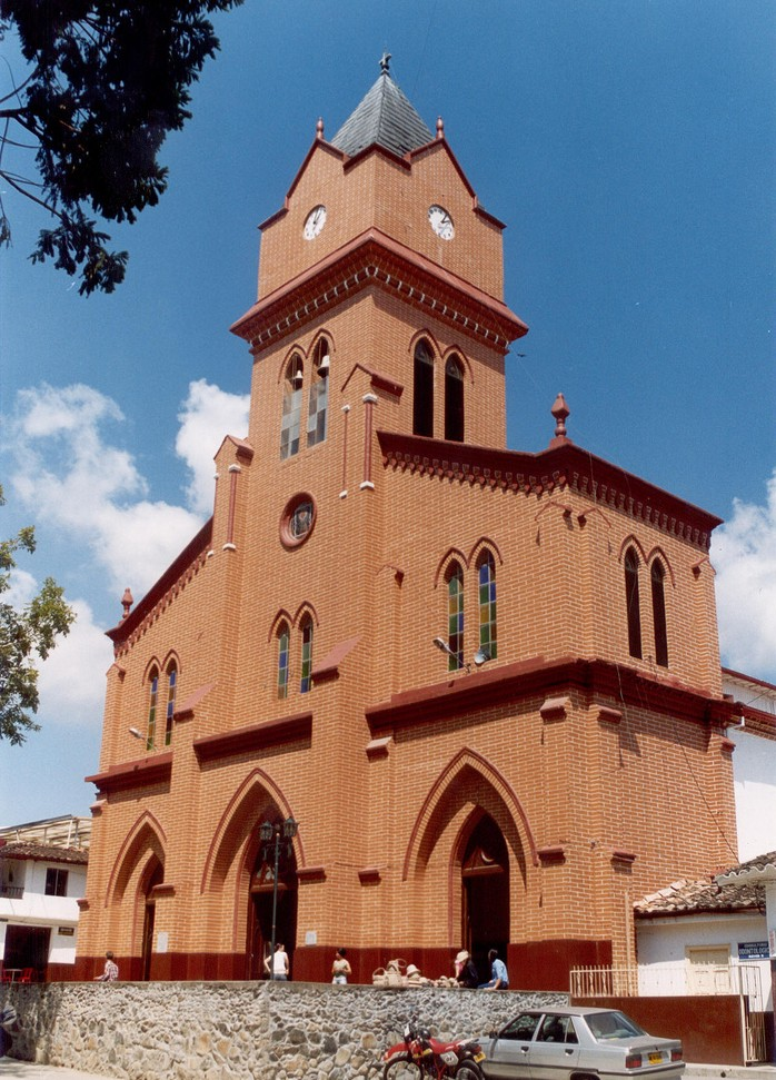 Iglesia de San Judas Tadeo, en El Santuario.